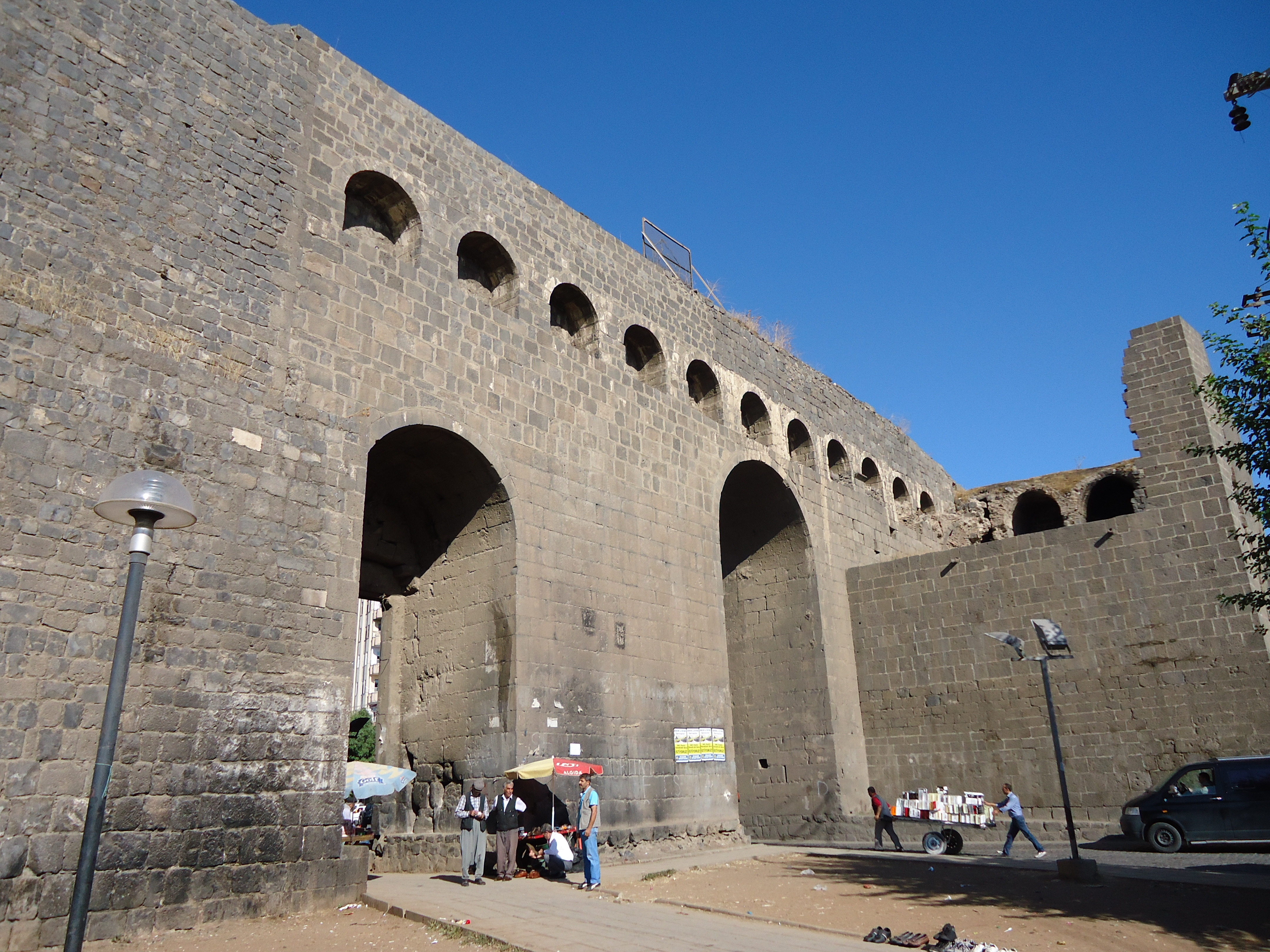 Die spätrömische Stadtmauer von Amida